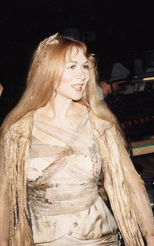 Ortrun Wenkel als "Erda" in "Siegfried" (Richard Wagner) bei einer Probenpause zum "Der Ring des Nibelungen" am Badischen Staatstheater Karlsruhe